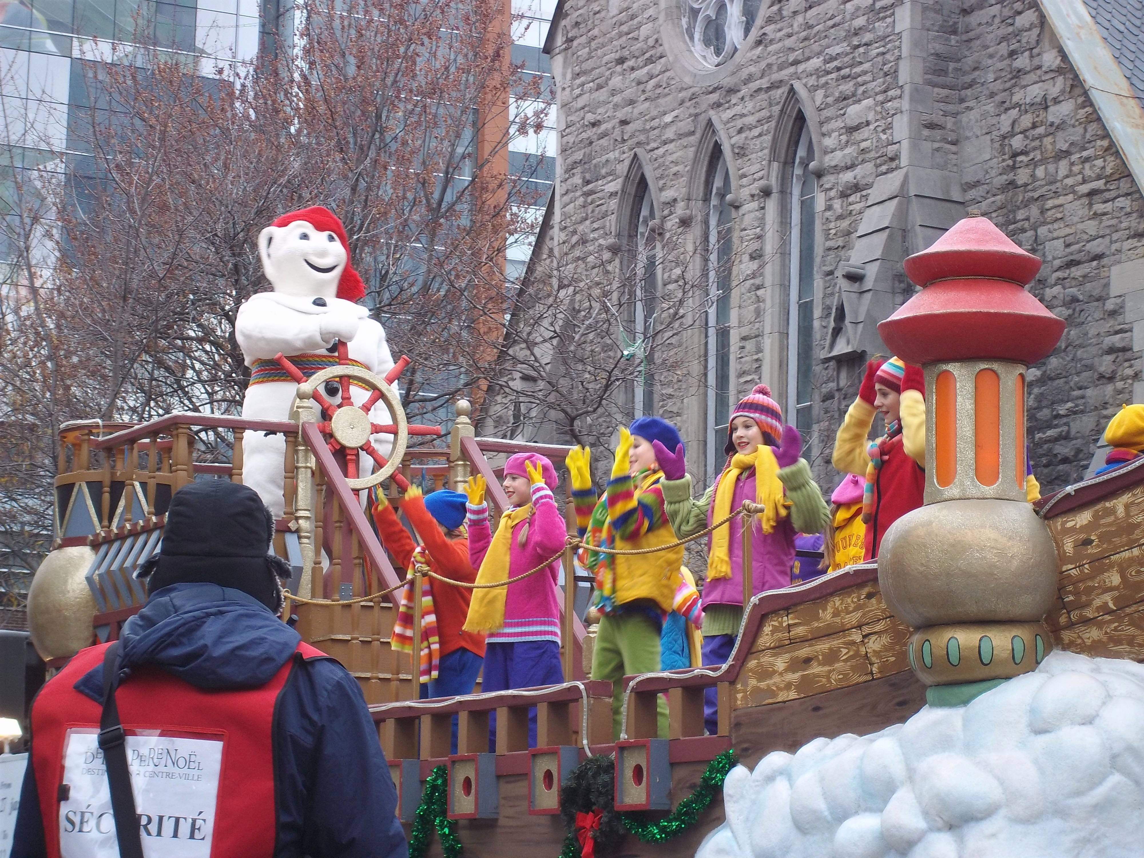 Défilé du Père Noël, rue Sainte-Catherine ouest, Montréal